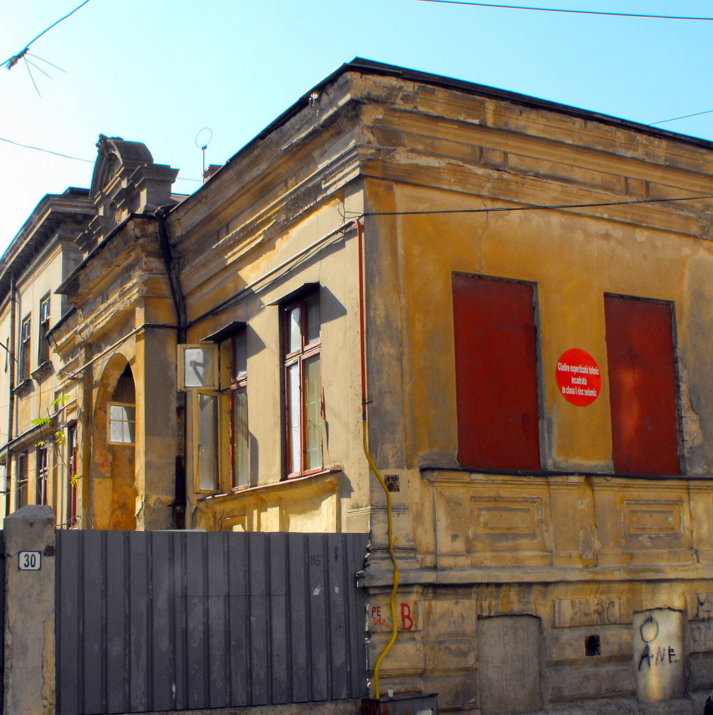 str.Cameliei 30